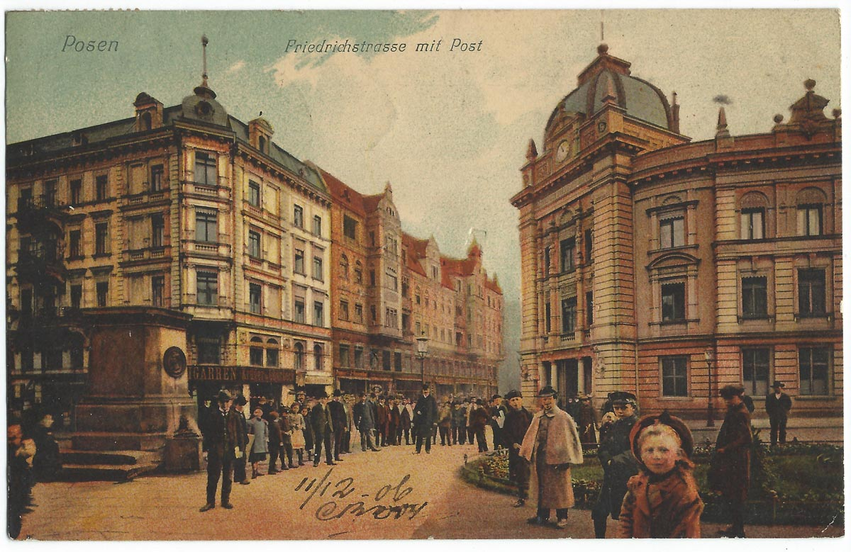 Vue de Posen au début du XXe siècle (aujourd'hui Poznań, en Pologne).